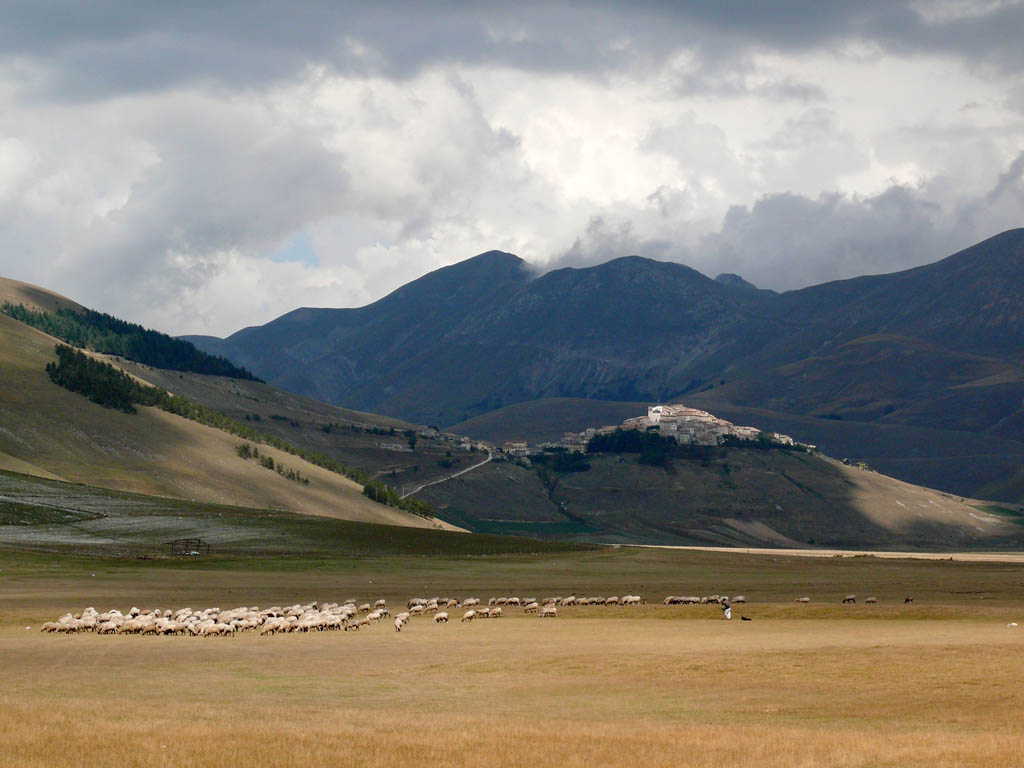 Piano Castellucio